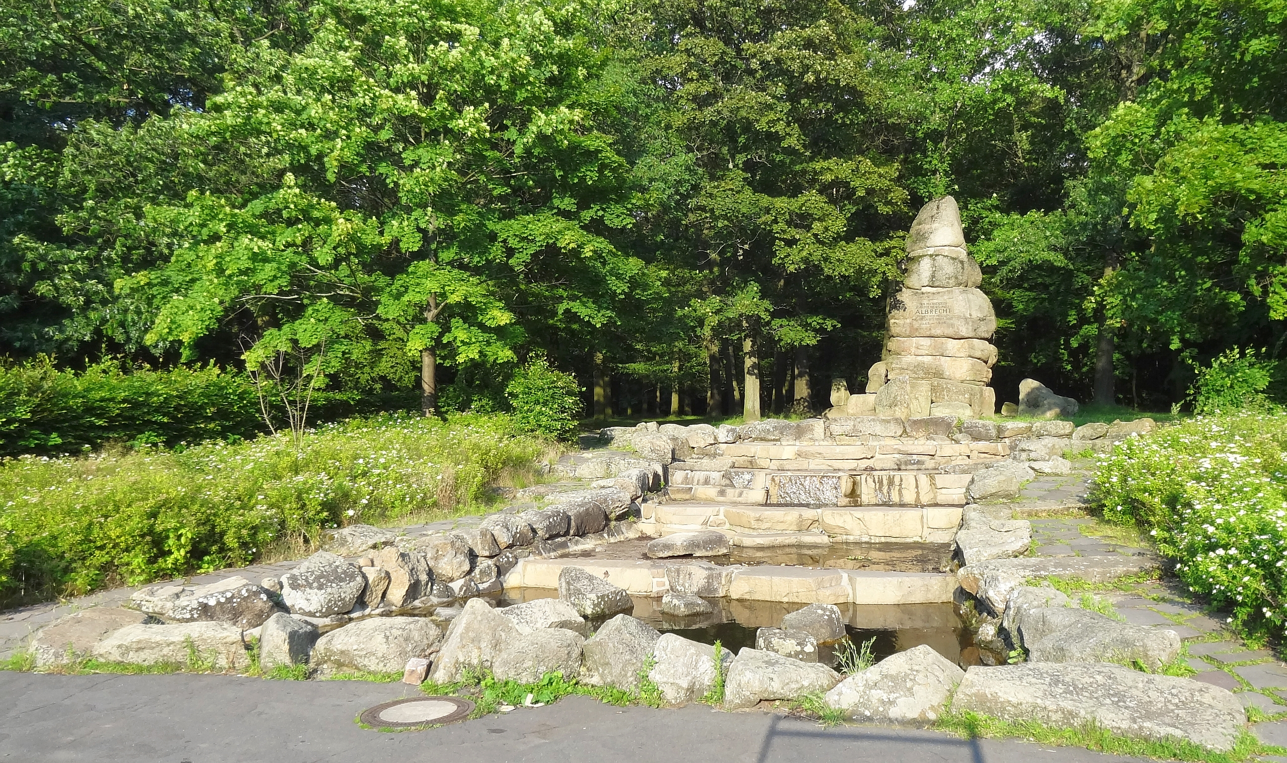 Denkmal für Prinz Albrecht mit Wasserfall.